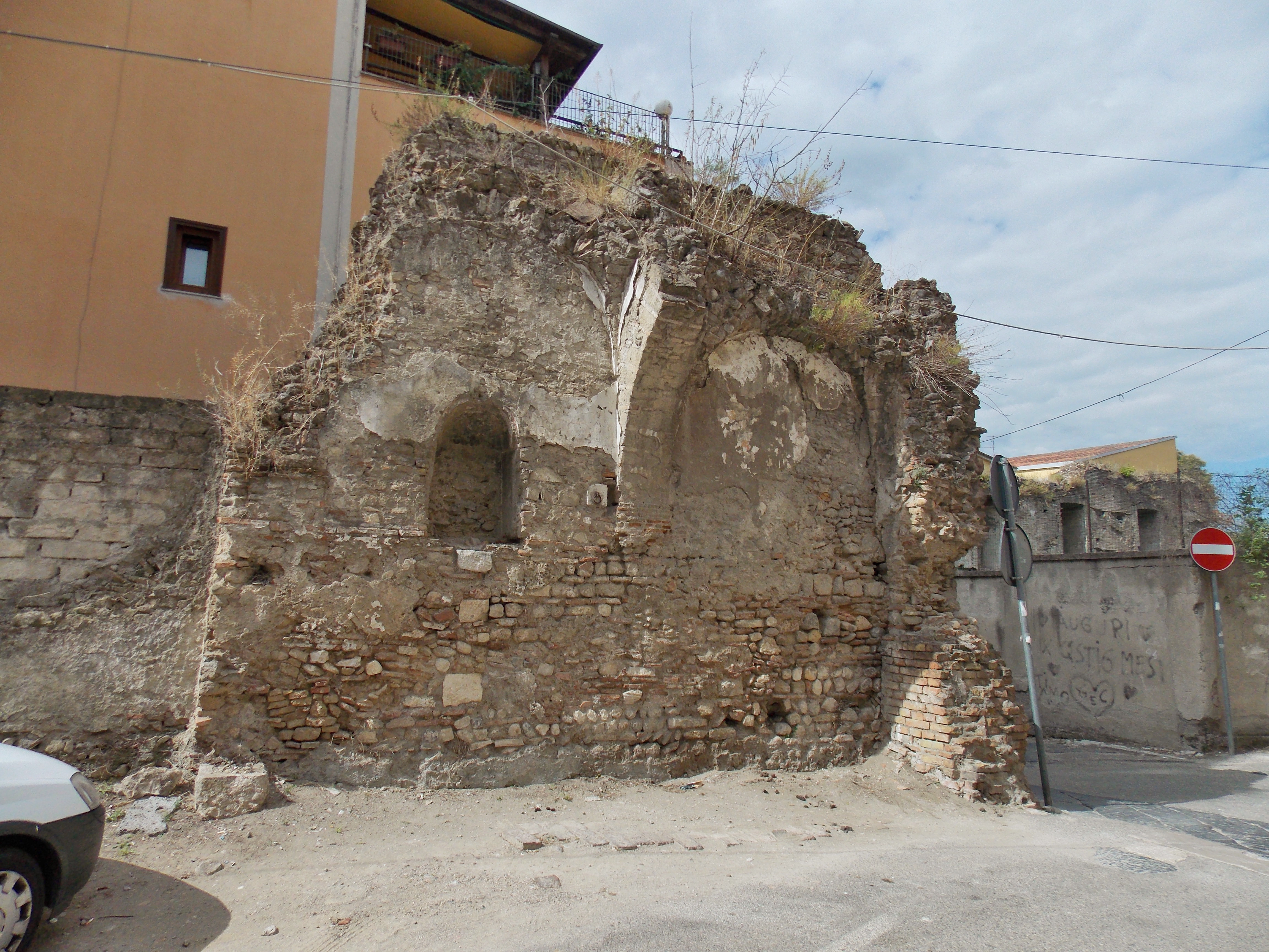 Ruderi della chiesa medievale di San Festo a Benevento